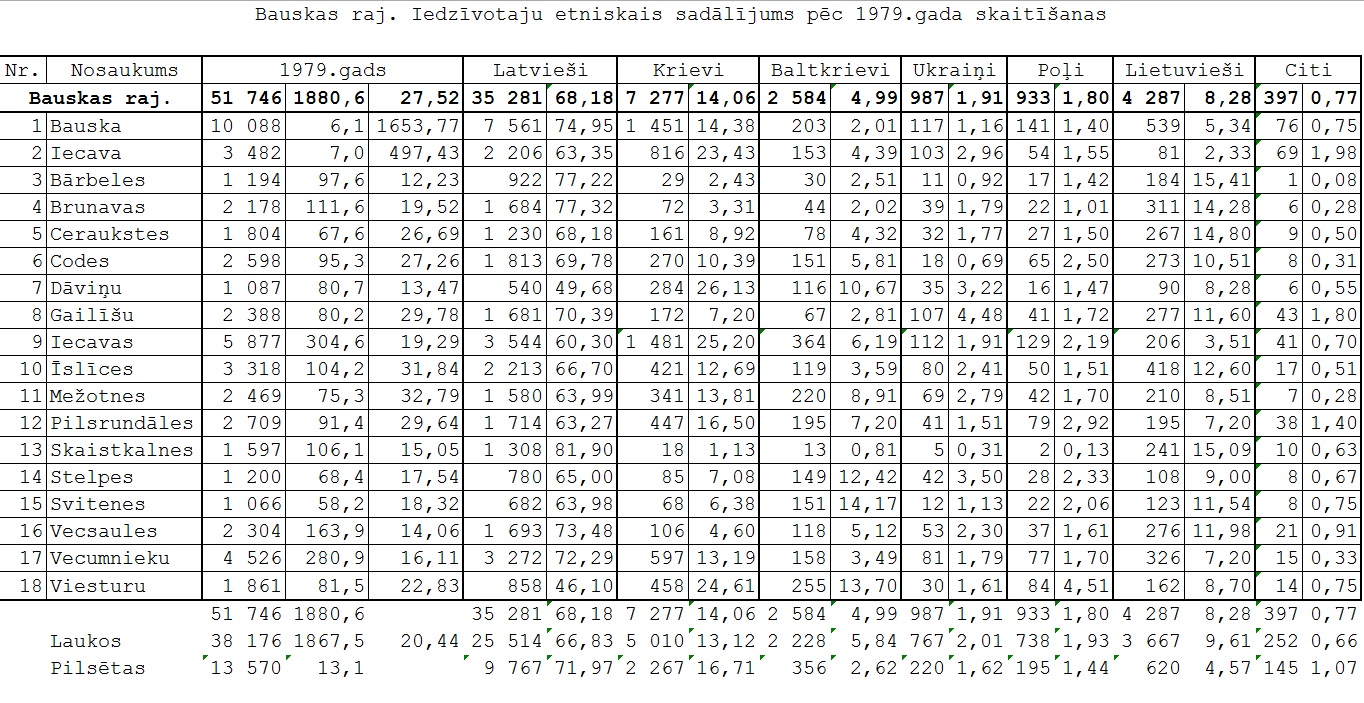 Latvijas 1979. gada tautas skaitīšanas dati